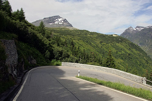 San Bernardino-Pass: spitze Kehre der Passstrasse